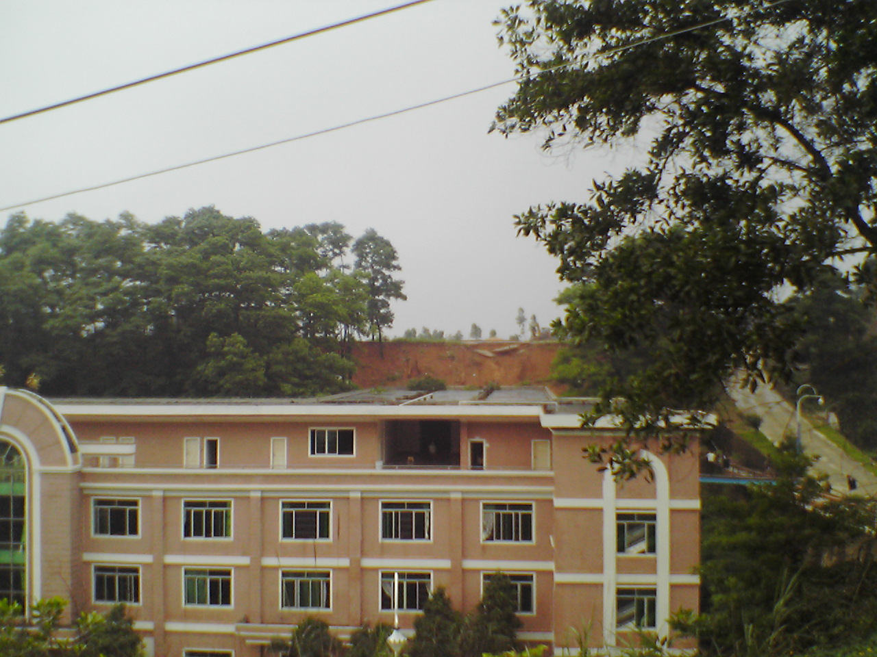 广州涉外学院发生山体滑坡